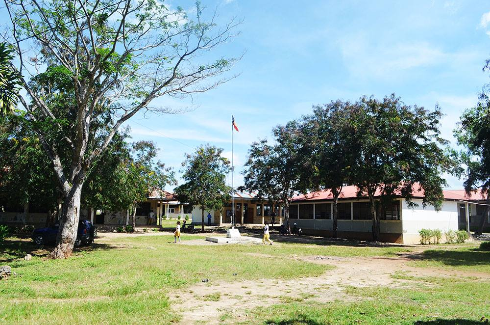 Escola Secundária Nº. 2 Vila Nova, Município Baucau